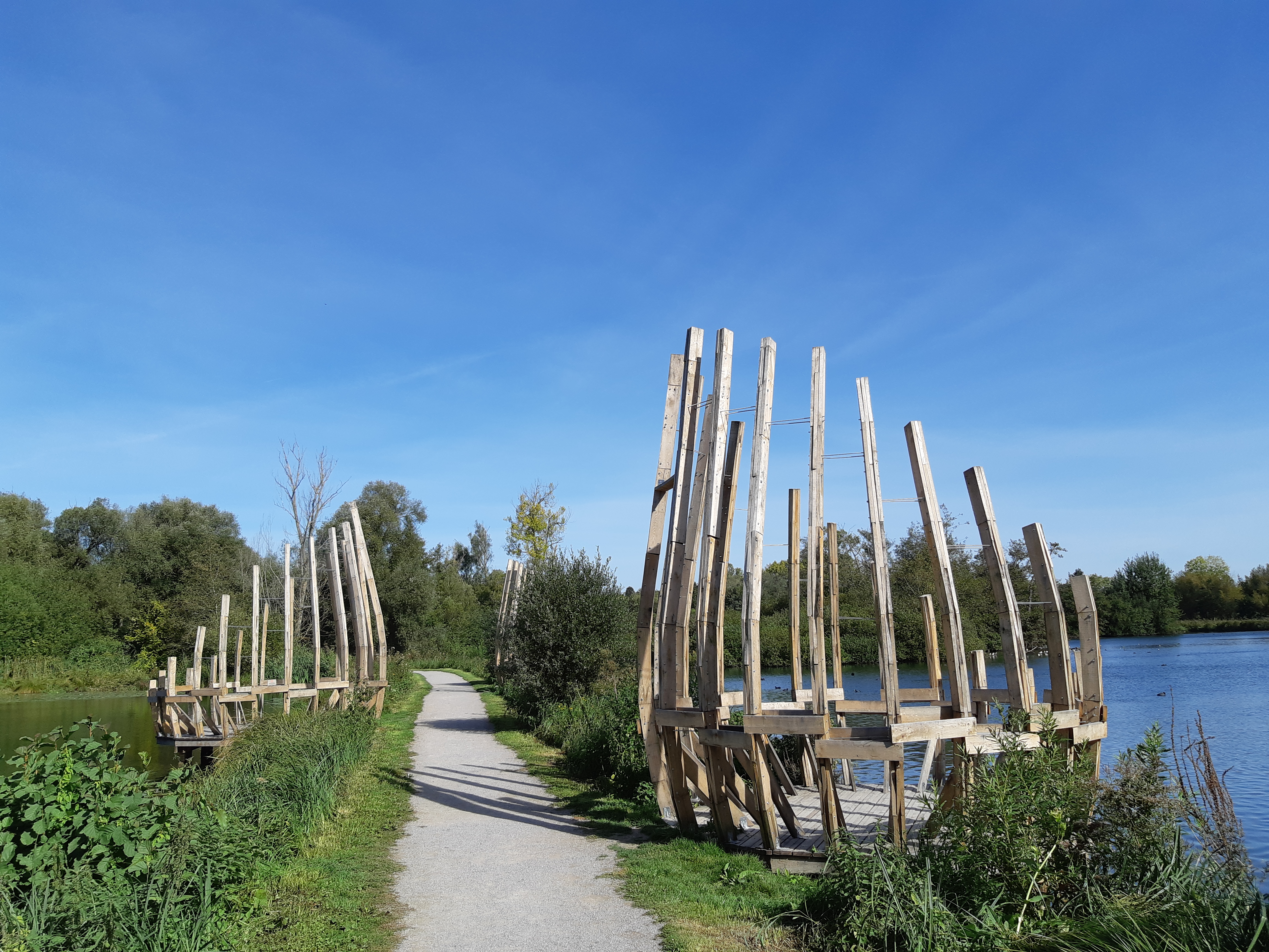 Création "Coup d'oeil entre deux eaux" au Parc de La Bouvaque à Abbeville (Somme - France)